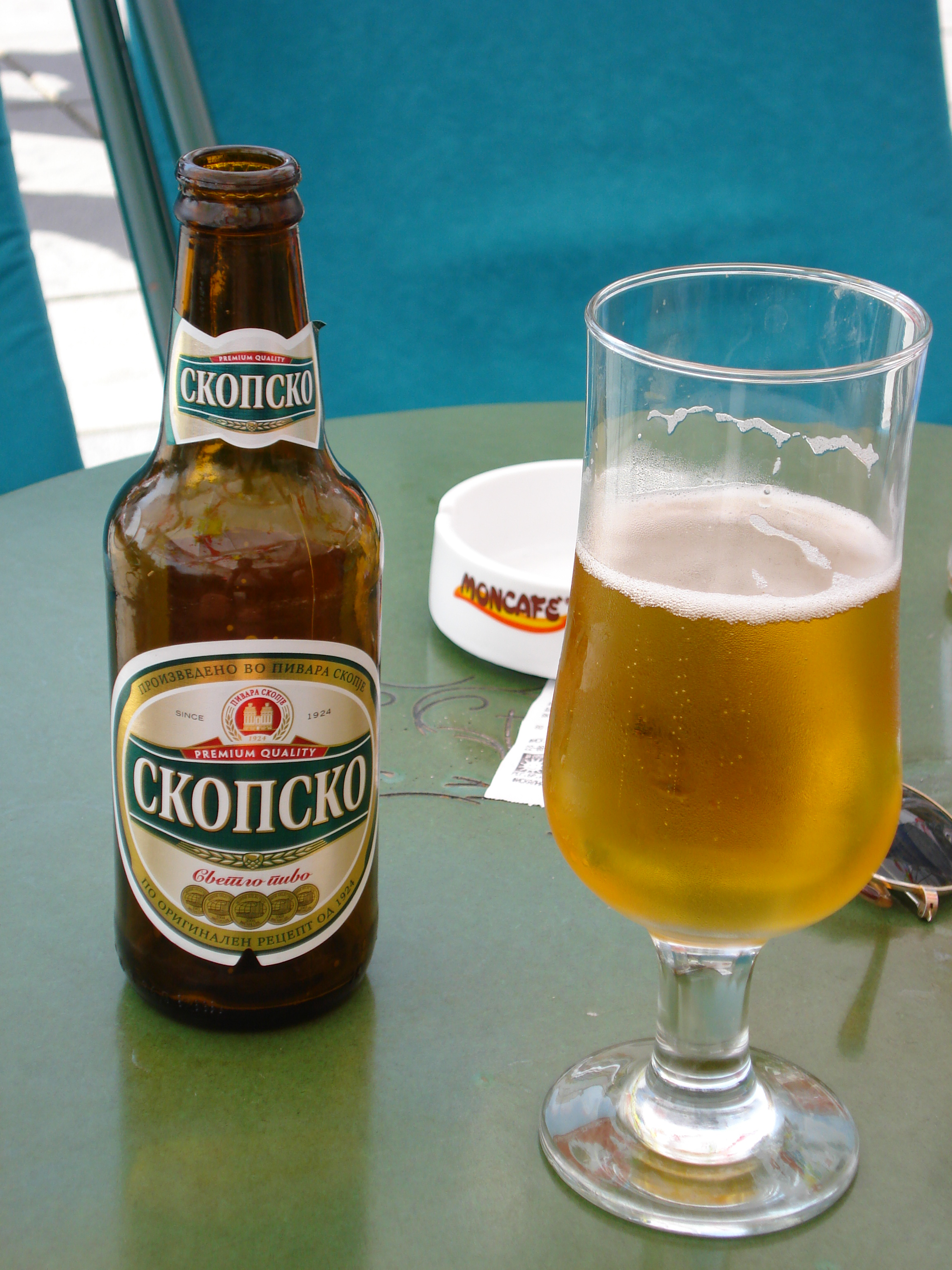 Skopsko in Ohrid